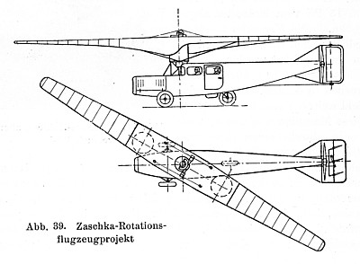 Zaschka-Rotationsflugzeugprojekt im Jahre 1928.